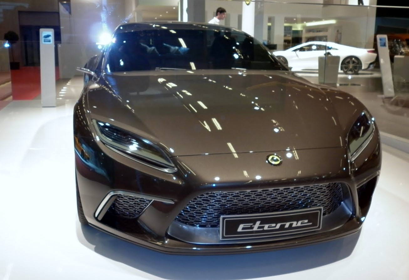 Stand Lotus Mondial de Paris